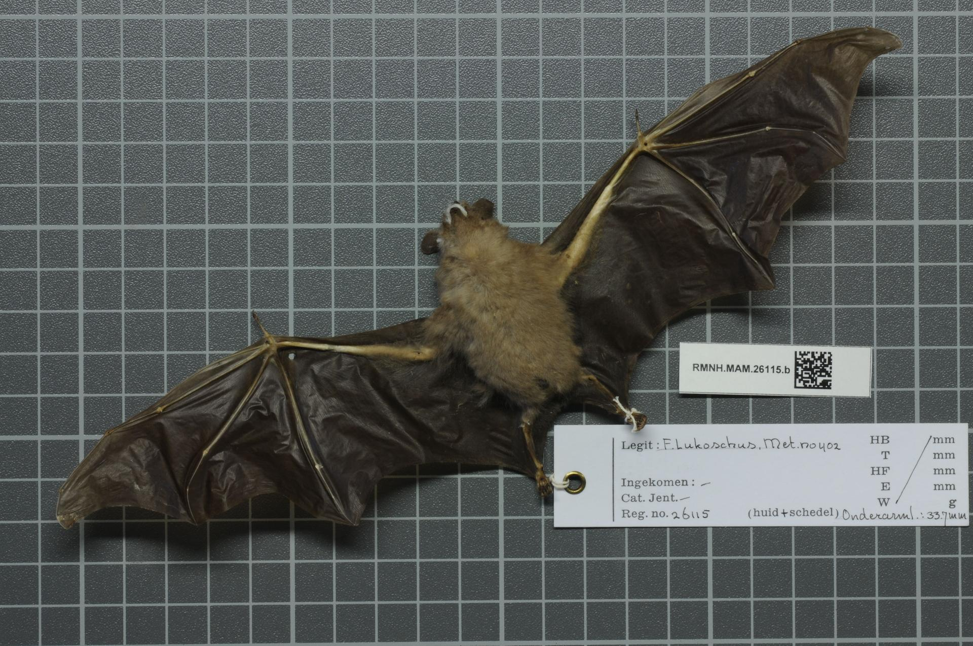 Rhinophylla pumilio